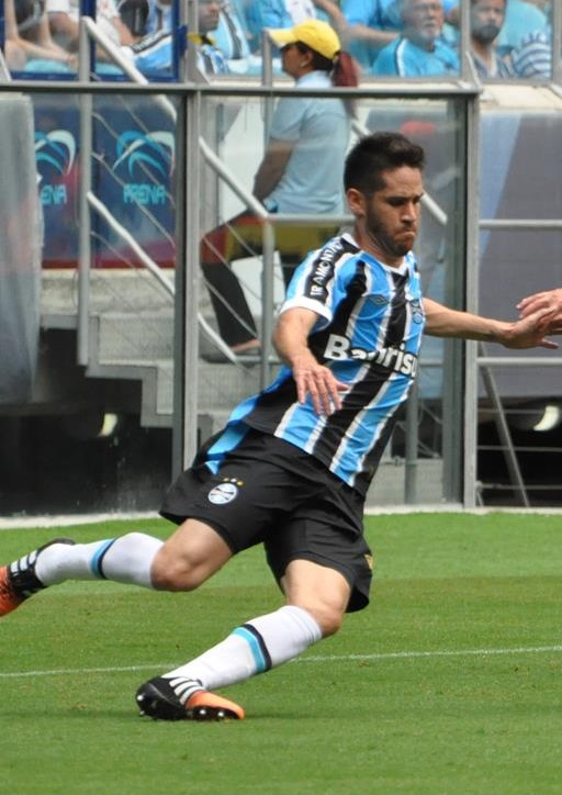 Marcelo Oliveira atuando pelo Grêmio em partida contra a União Frederiquense pelo Campeonato Gaúcho de 2015.